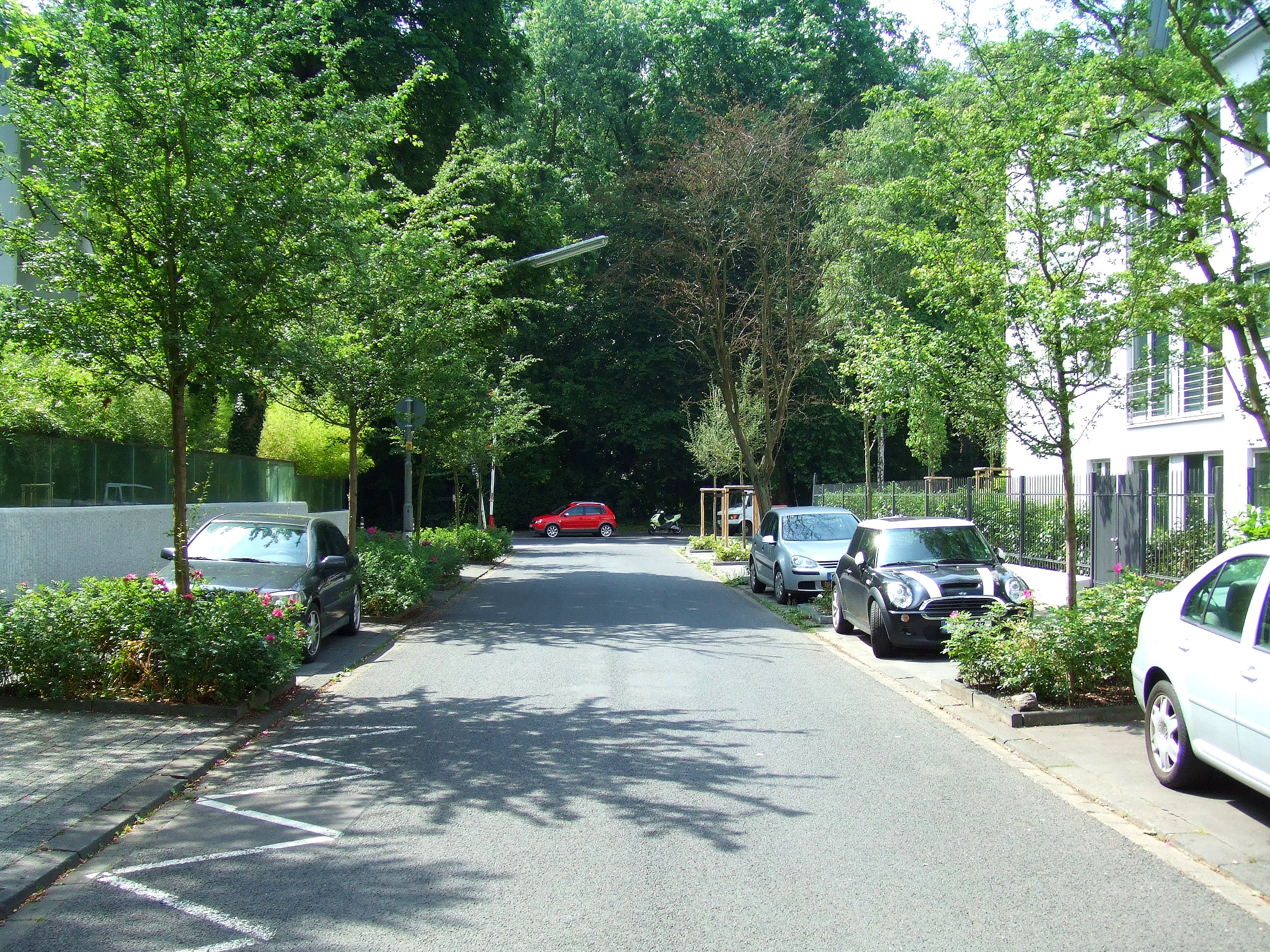 Blick von der Kölner Vincenz-Statz-Str. auf die Kreuzung Friedrich-Schmitt-Straße, aufgenommen am 13.06.2007. Schauplatz der Entführung von Hanns-Martin Schleyer 1977